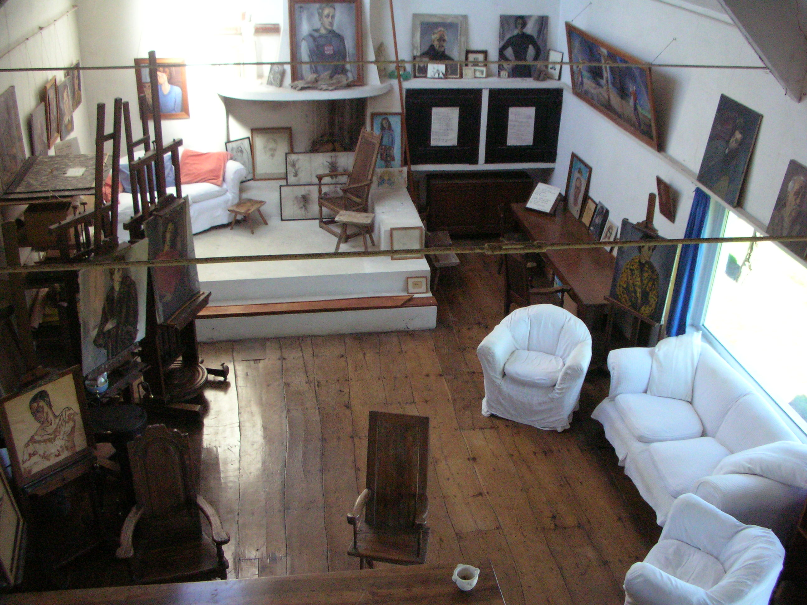 Atelier de peinture au Regenboog, ou se tinrent nombre de réunions pour la Paix